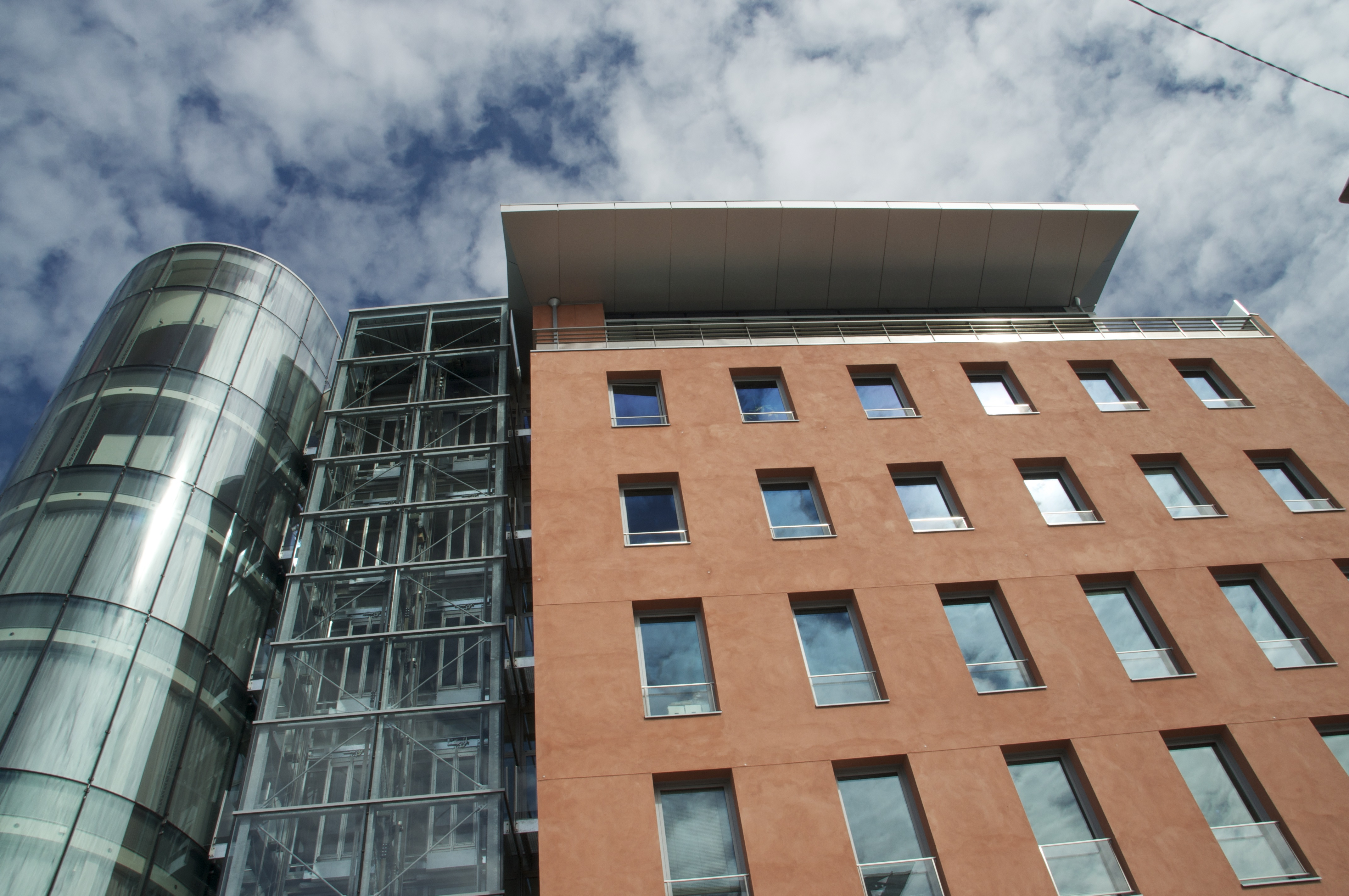 Un bâtiment des MMA: tour Novaxis VIII dans le quartier du même nom au Mans.